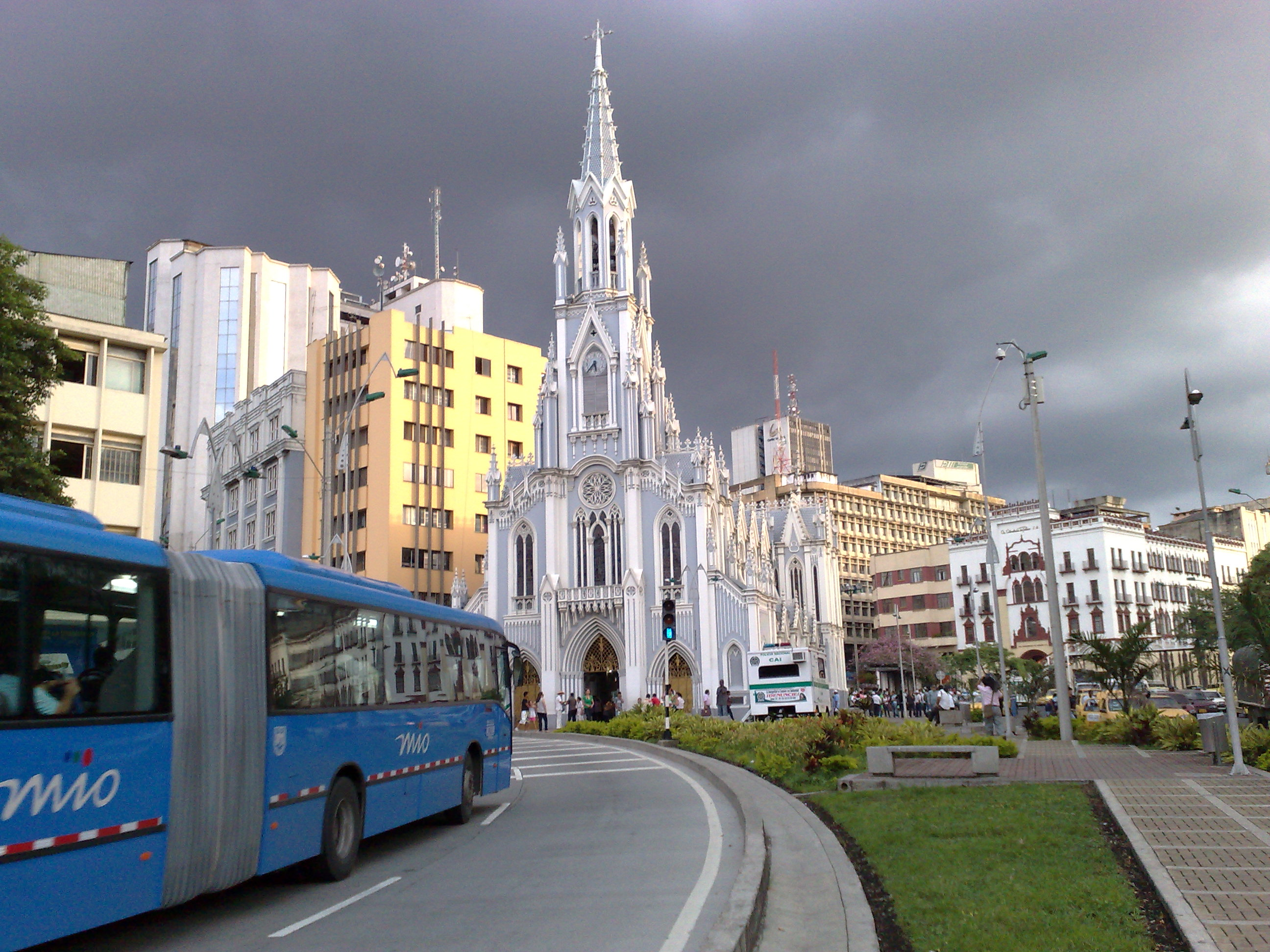 Iglesia de la Ermita Cali